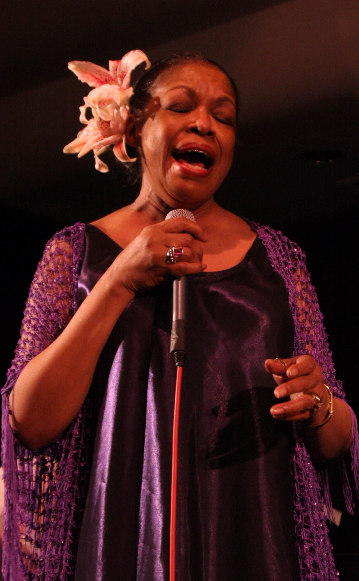 Photograph Ronnie Wells